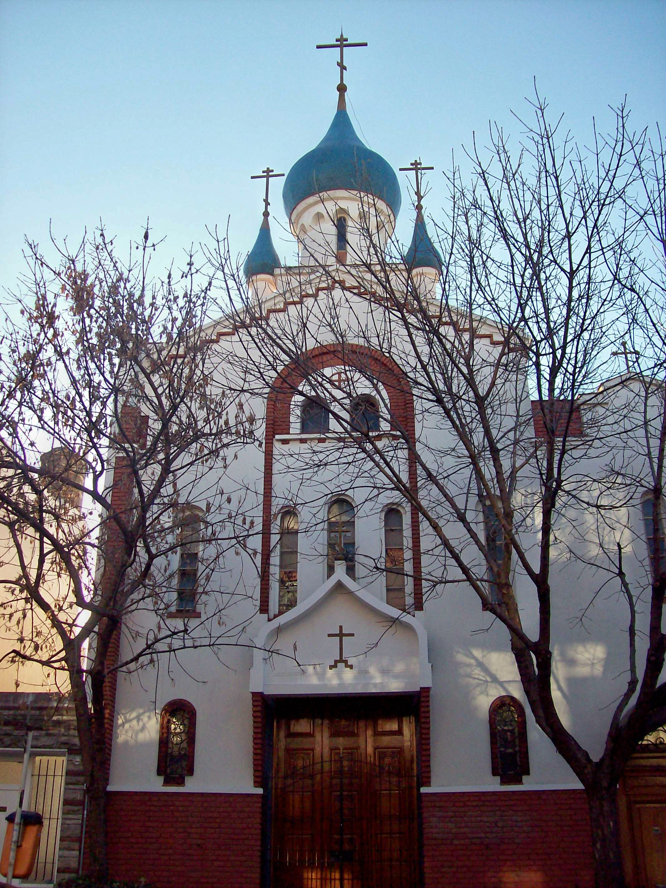 Catedral Ortodoxa Rusa de la Resurrección, Buenos Aires -Dirección, Nuñez 3541, barrio de Saavedra, Buenos Aires, Argentina